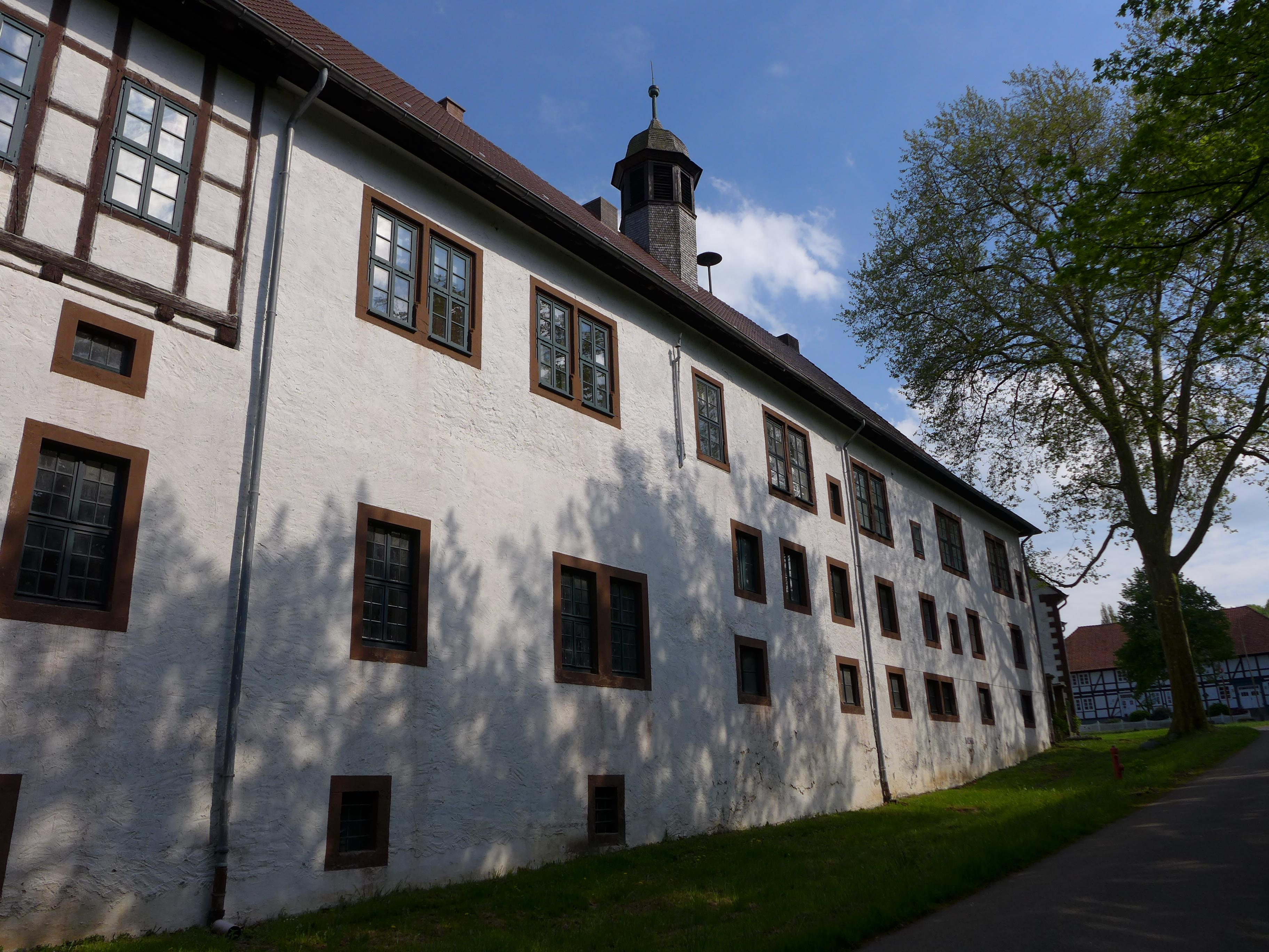 Domäne Rotenkirchen Westseite Teilansicht